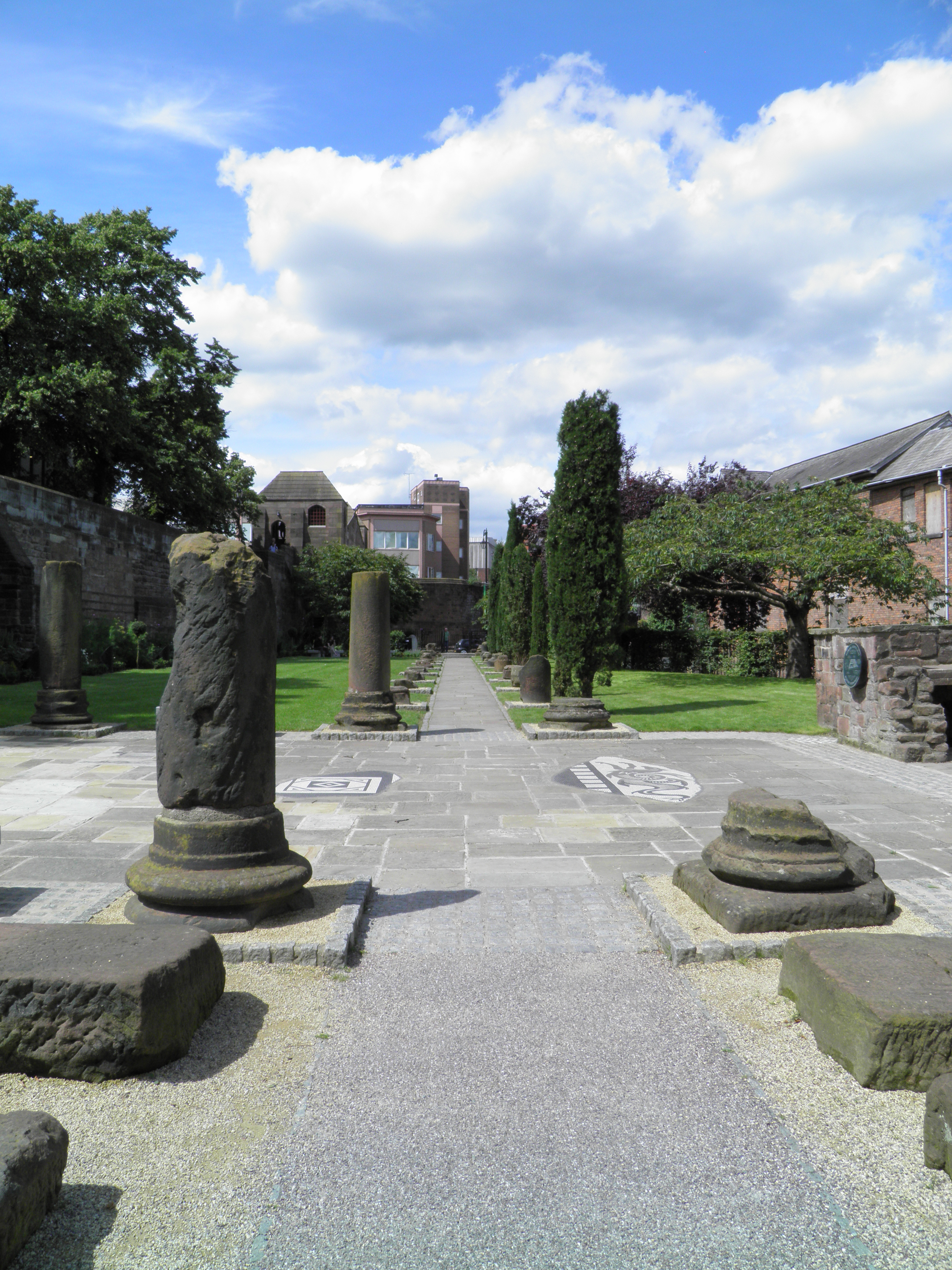 Deva Victrix (Chester, UK)